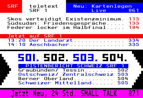 SRF 1 Teletext